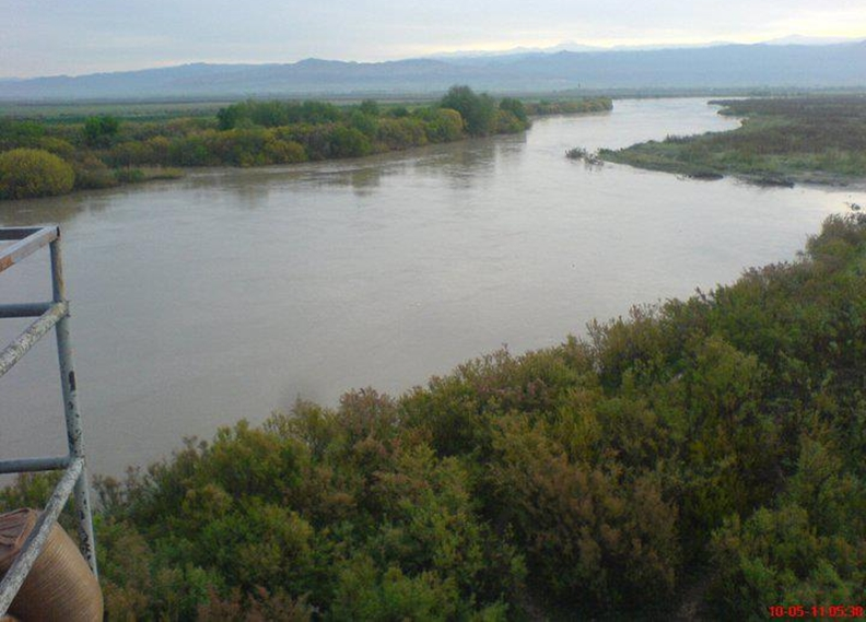 IĞDIR ERMENİSTAN ARASI ARAS NEHRİ